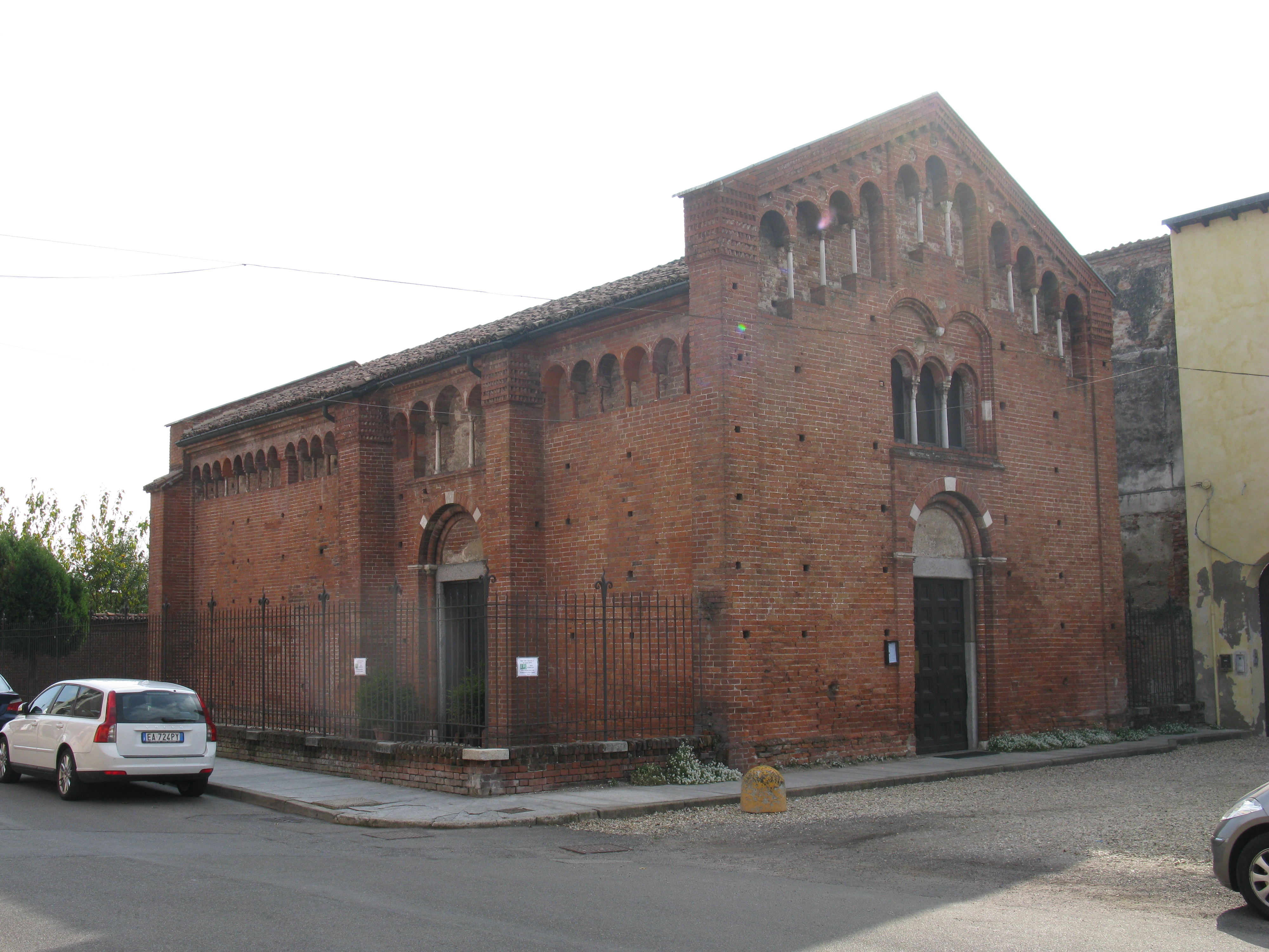 Pavia, chiesa di San Lazzaro